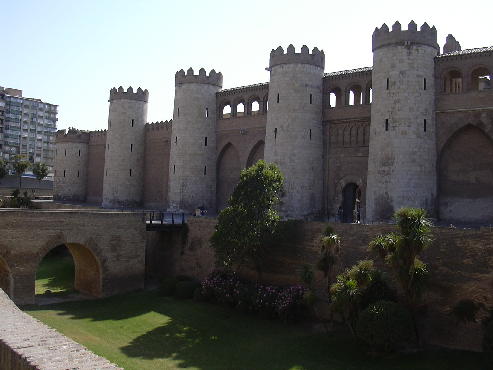 Vista del Palacio de Aljafería